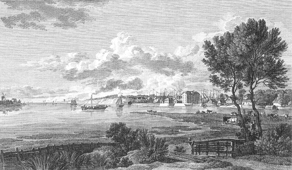 Bildvorlage von Anton Radl (1774–1852) aus dem Jahr 1818/1819: Blick auf Vegesack, links das Oldenburgische Land, mitte-rechts die Mündung der Lesum, im Vordergrund die Landzunge zwischen Weser und Lesum, auf dem Strom das Dampfschiff Die Weser von 1817.